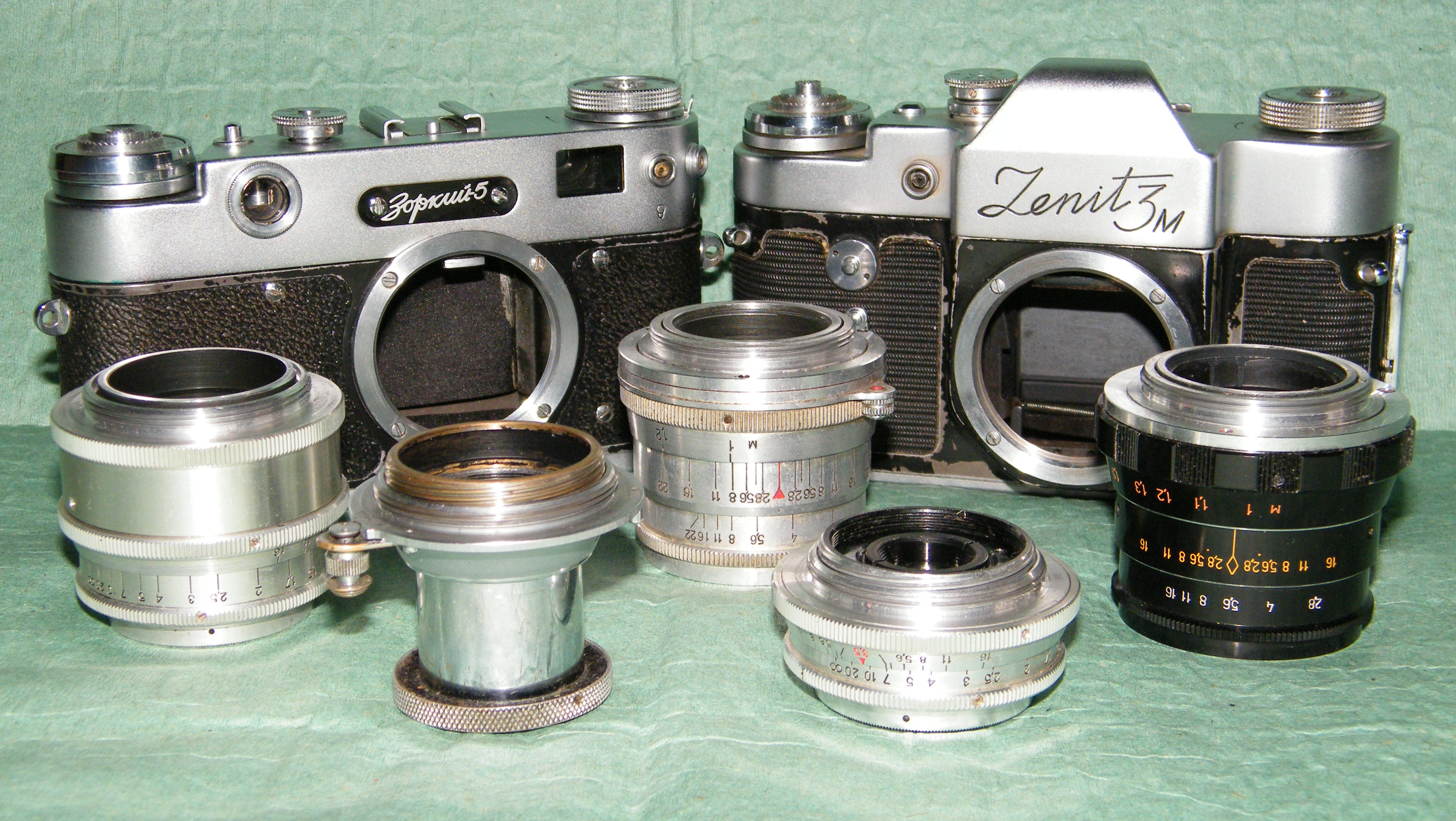 Советские объективы с креплением М39х1